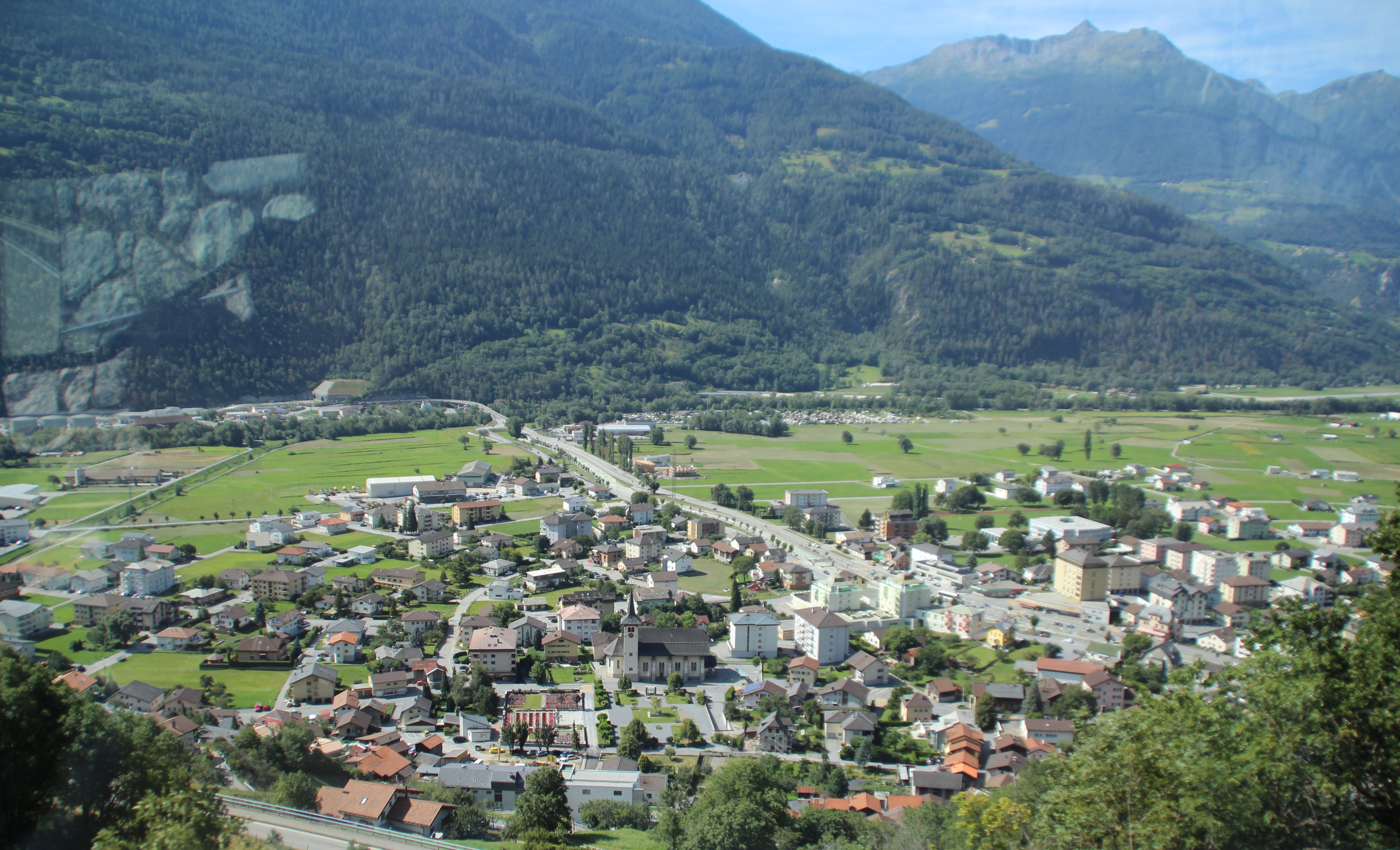 Gampel (rechts) und Steg (links)